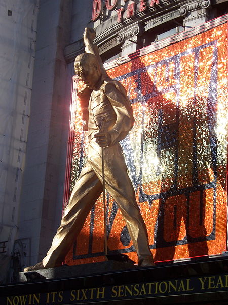 Standbeeld boven de ingang van de musical